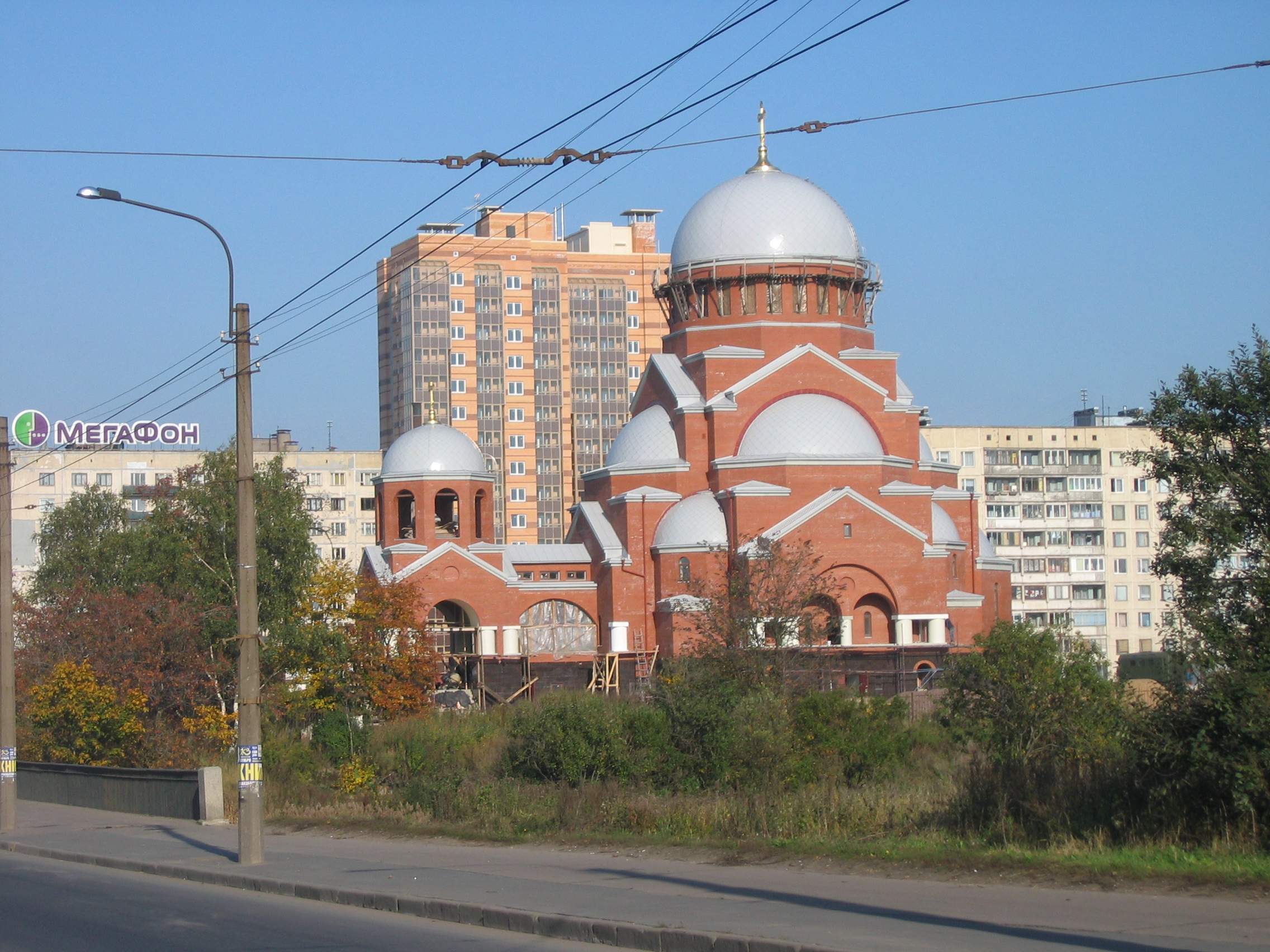 Sretenia Gospodnya Church